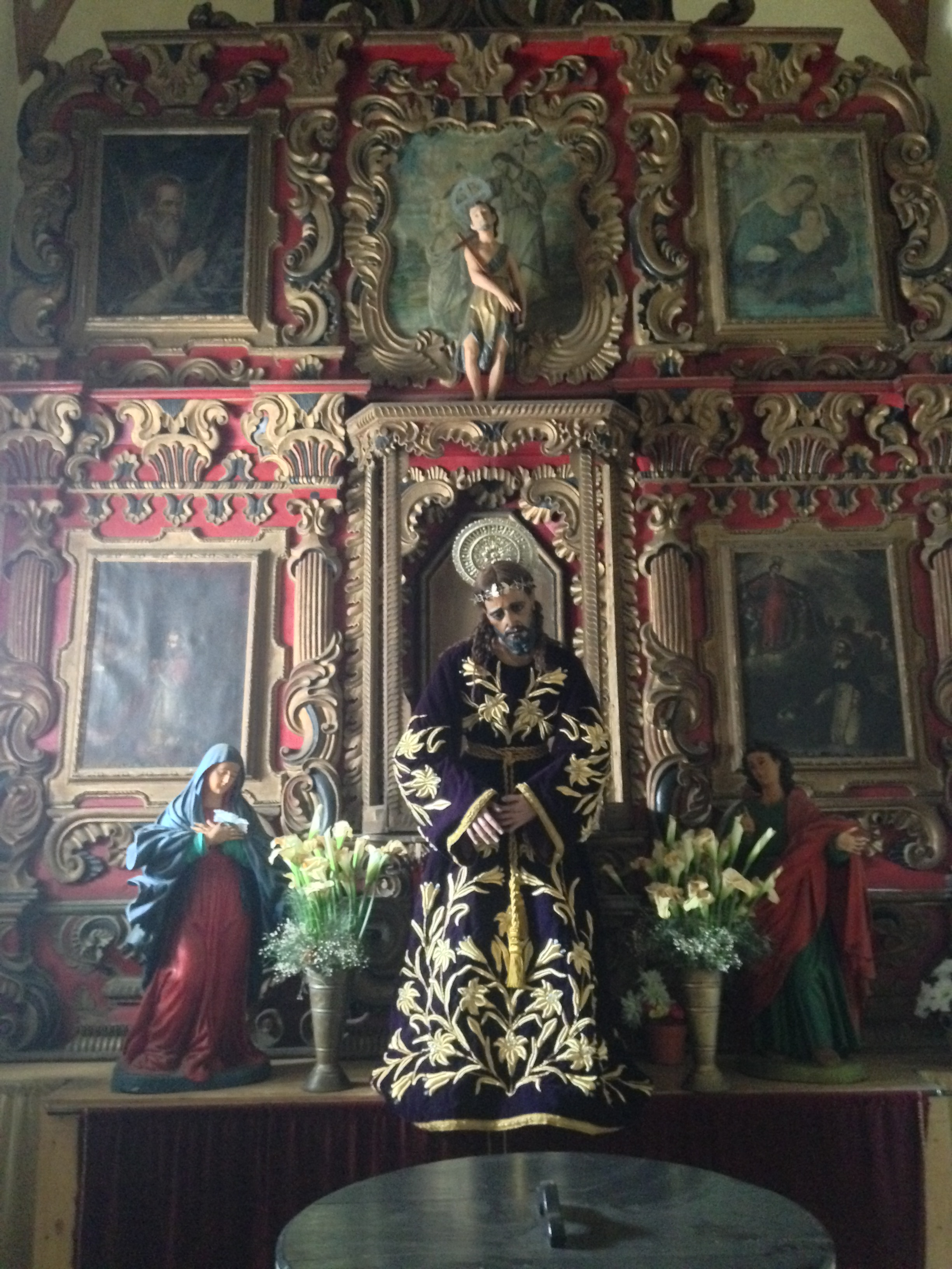 El único retablo barroco que sobrevive en la Catedral de Cobán. Diciembre de 2015. Al frente, una imagen de Jesús Nazareno.